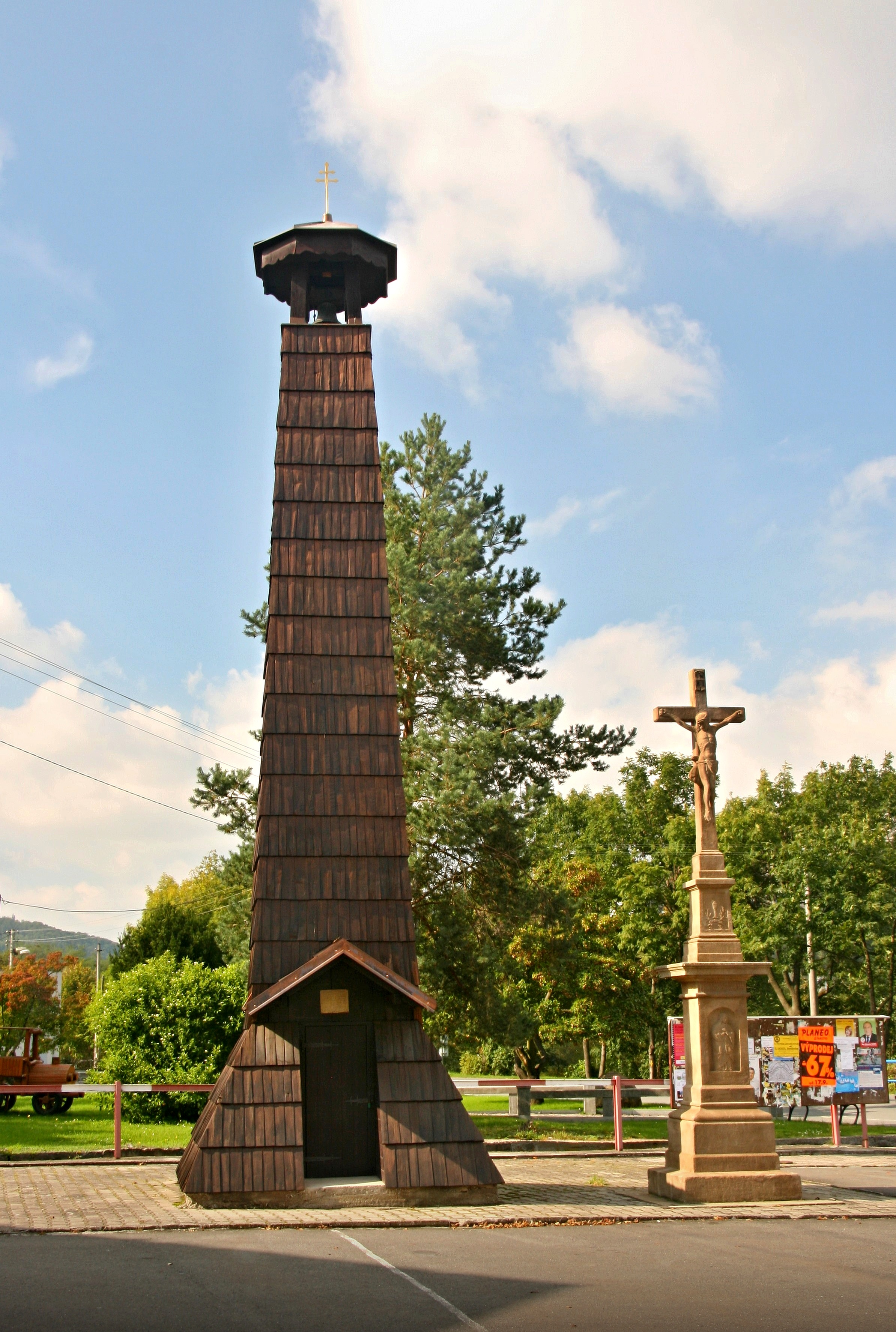 Zvonice, střed obce, Jakubčovice nad Odrou.